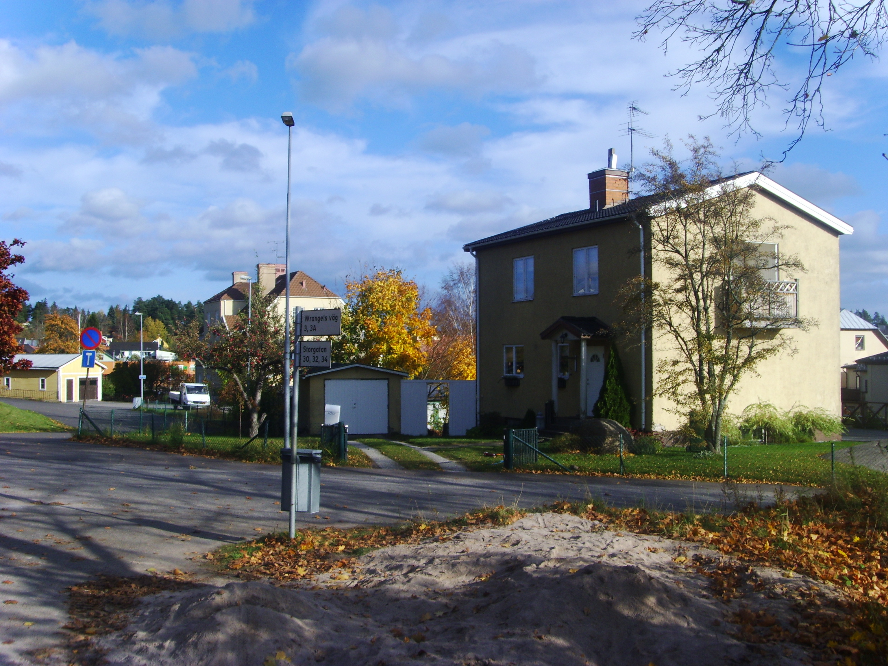 Nära Boxholms centrum